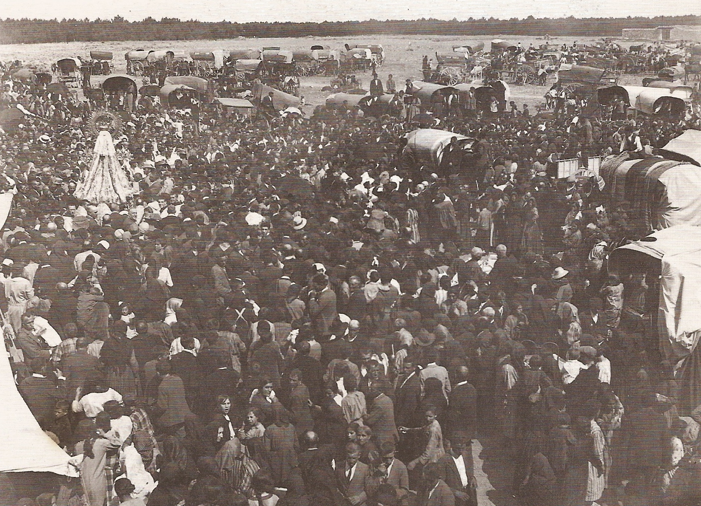 Romería de Nuestra Señora del Henar (Cuéllar) a principios del siglo XX